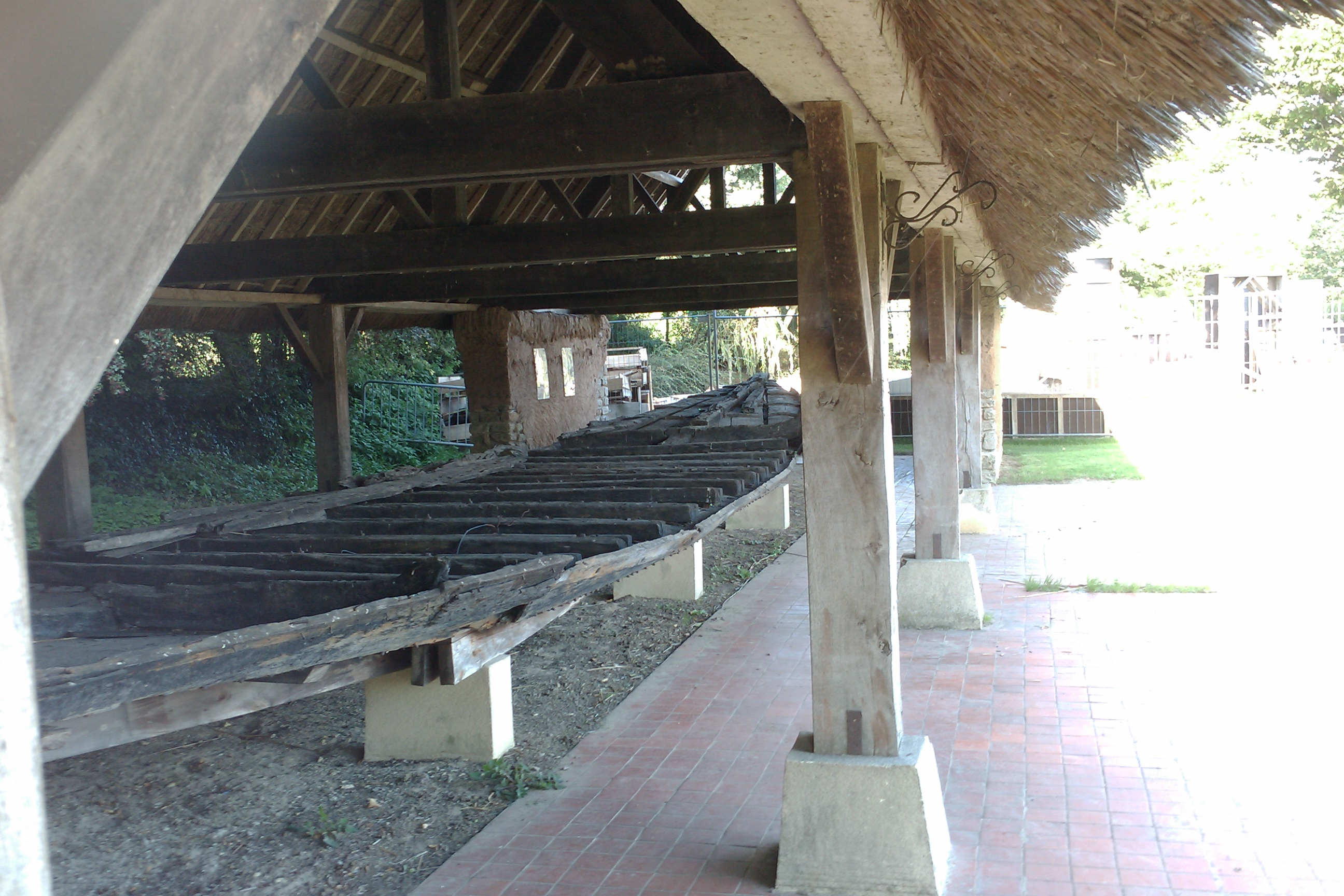 Abri à gabarre de Tribehou et sa gabarre Plus d'infos sur [1]